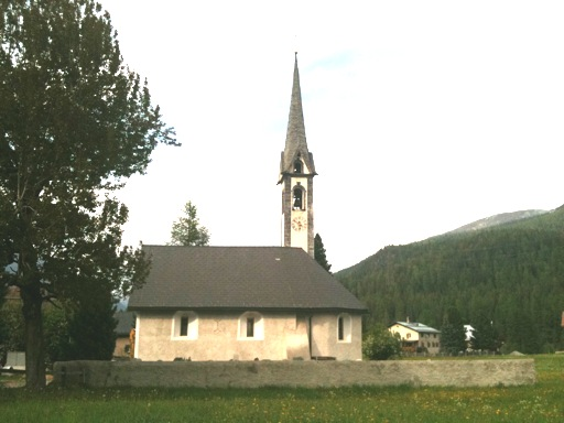 reformierte Kirche Cinuos-chel, Kanton Graubünden